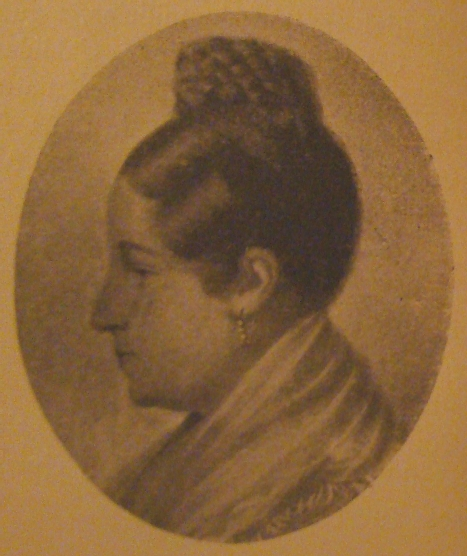 Juana García, esposa del general Manuel Guillermo Pinto, patricia argentina.